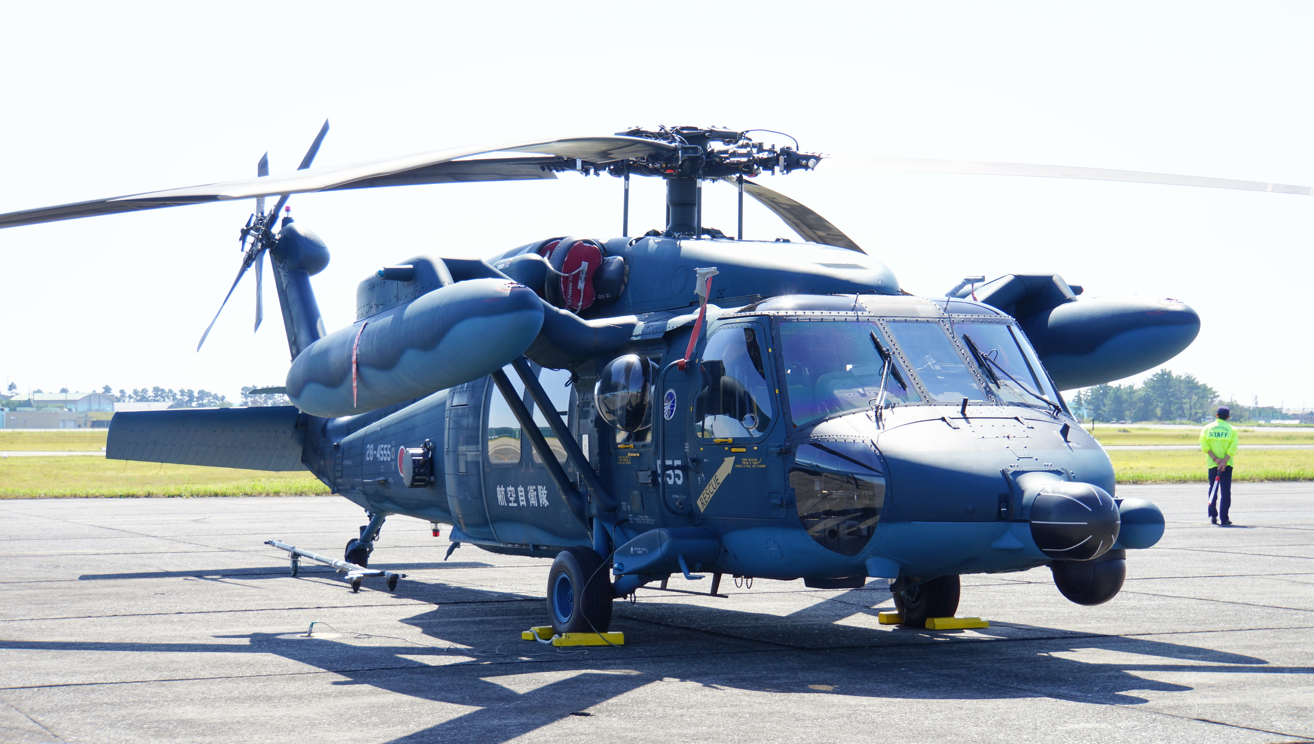 航空自衛隊 UH-60J救難ヘリコプター（28-4555号機） 右前面。2014年9月28日 浜松基地にて。